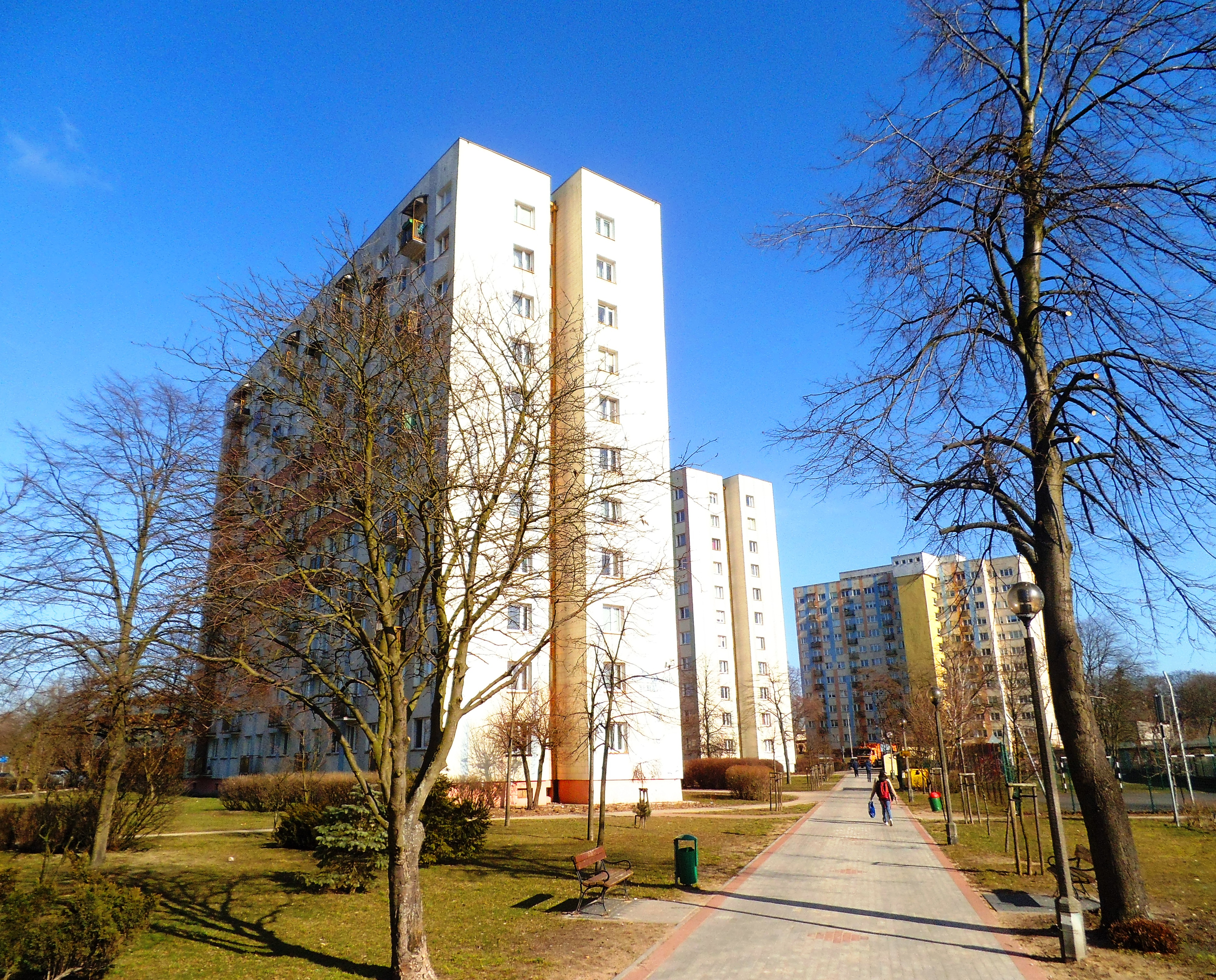 Spółdzielnia Mieszkaniowa Kopernik (Toruń)